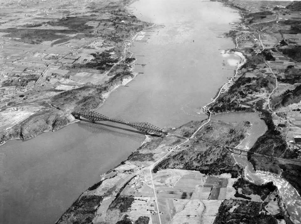 Le Pont de Québec vers 1925. La ville de Québec est à gauche.